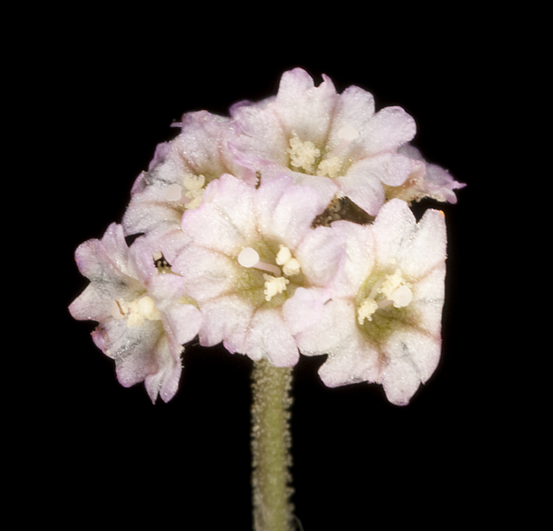 KRT4764